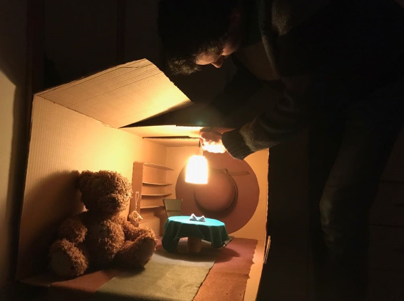 במהלך צילומי הסרט לבדיתי - האגדה על מרים ילן שטקליס